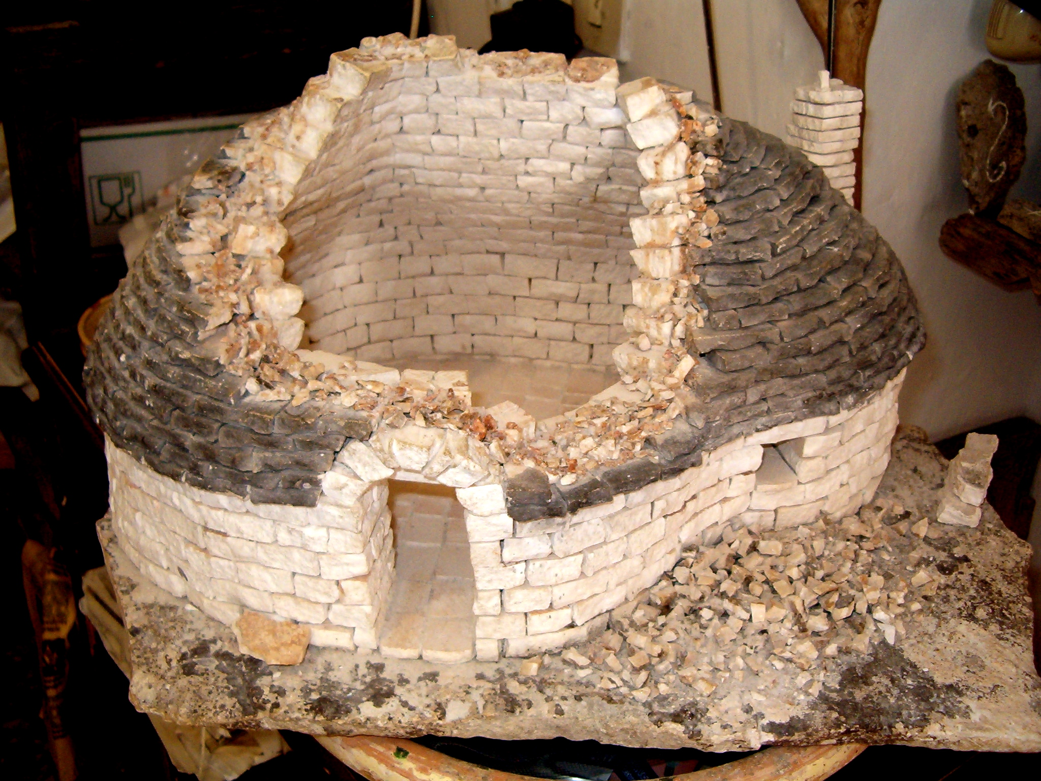 Spaccato di un trullo di Alberobello (modello in scala)